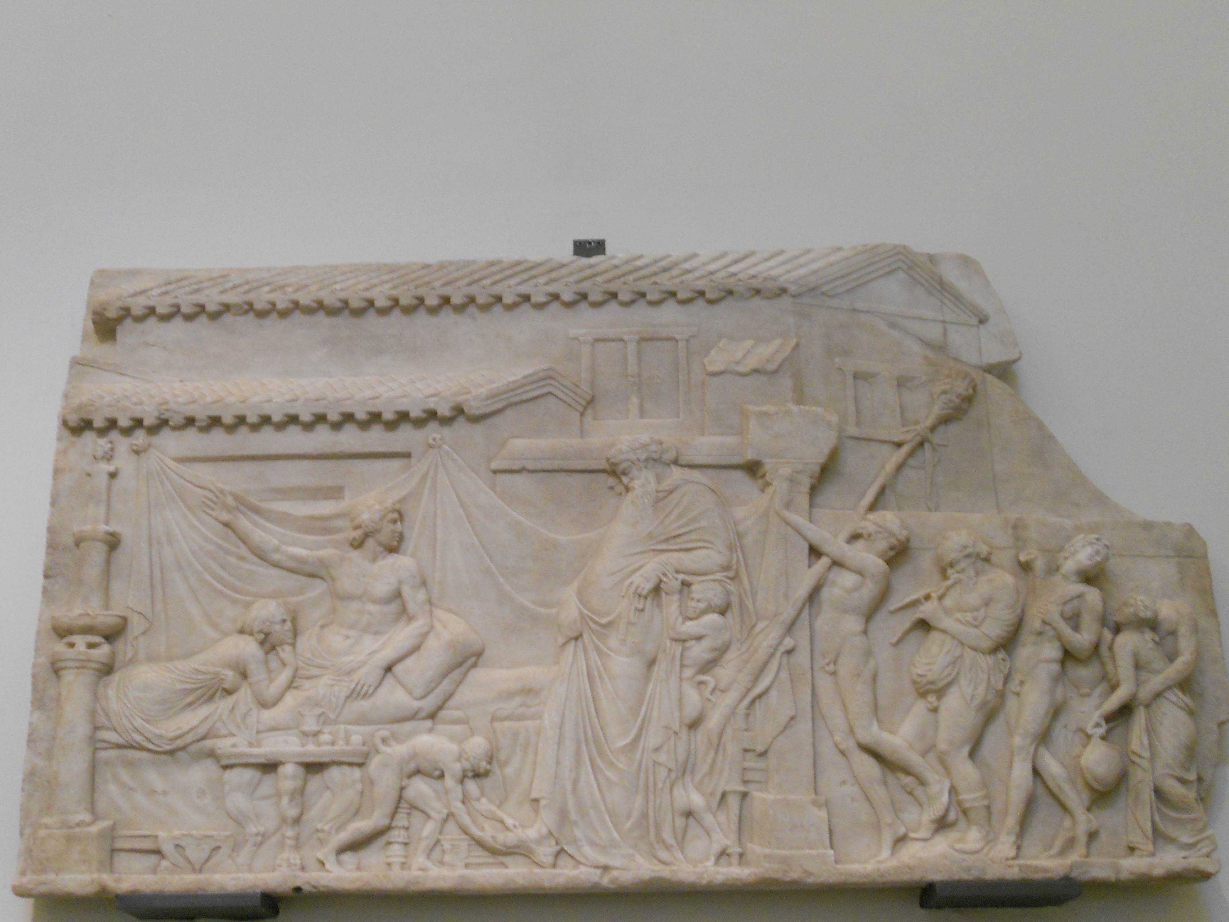 Rilievo in marmo con Dioniso ed Ikario, facente parte della Collezione Farnese (non della Collezione Borgia* !), oggi al Museo Archeologico Nazionale di Napoli (inv. 6713). Il rilievo (di cui sono note altre repliche in diversi musei del mondo) mostra Dioniso, come vecchio ebbro sostenuto da un satirello e seguito da un corteo di Satiri e Menadi, che arriva in casa di Ikarios disteso su di una kline in compagnia di una donna. (* attenzione! In "S. De Caro, Il Museo Archeologico Nazionale di Napoli, Napoli 1994" il rilievo è attribuito erroneamente alla Collezione Borgia, derivato dall'inventario generale dove è segnato in matita "Borgia?".)